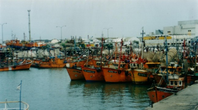 Mar del Plata Harbour